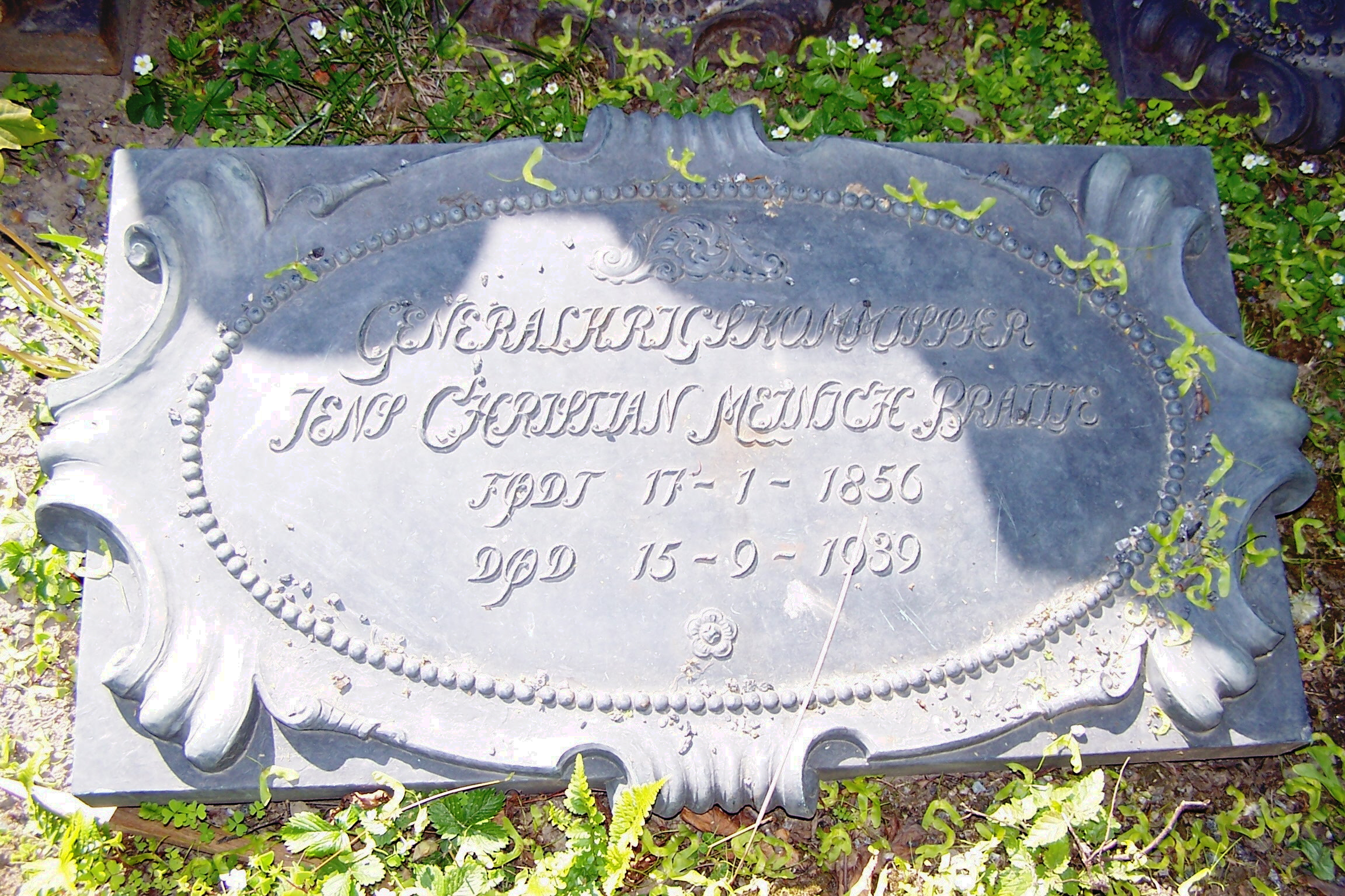 Tomb of Jens Christian Meinich Bratlie at Vår Frelsers gravlund, Oslo